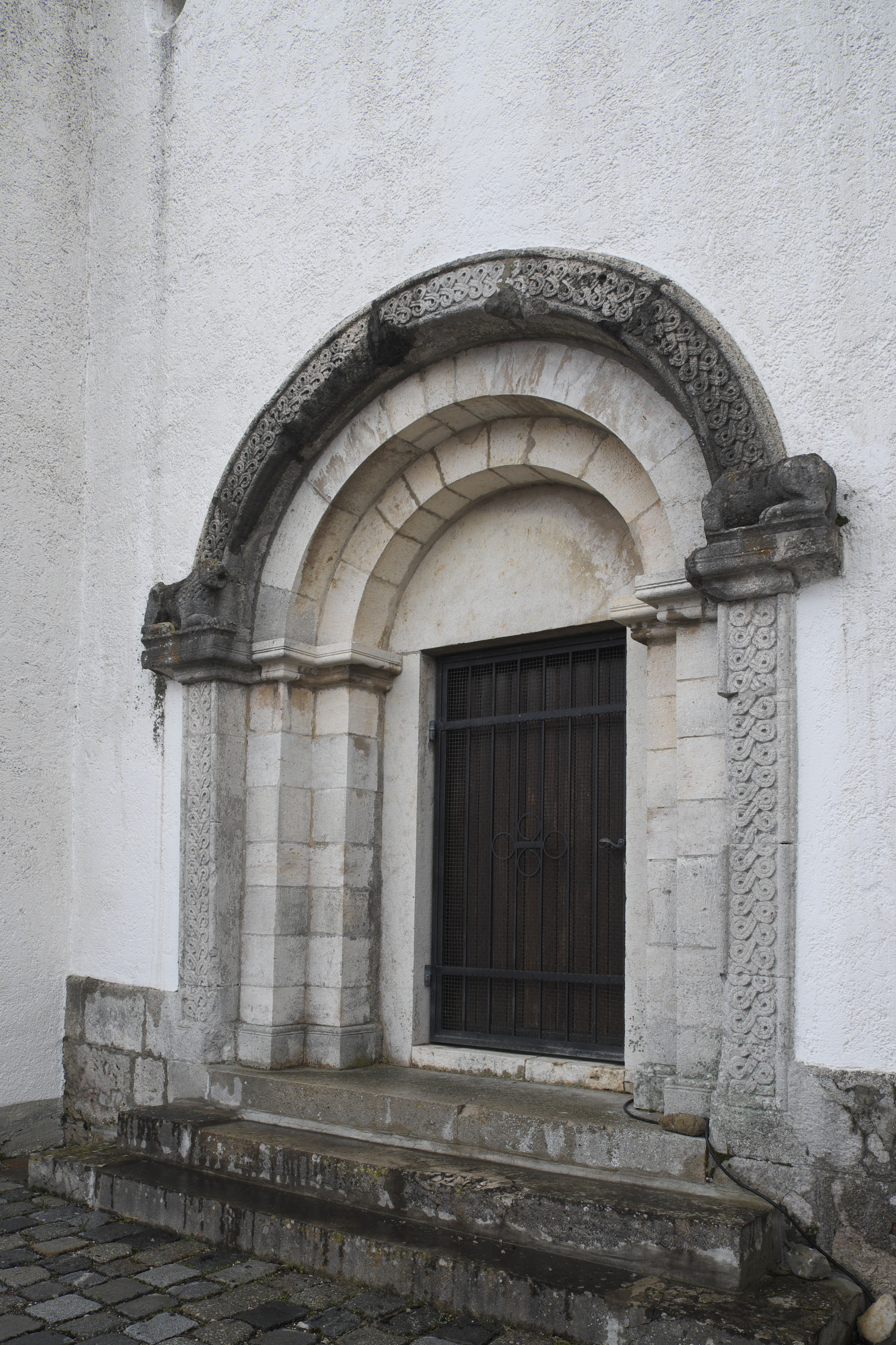 Katholische Filialkirche St. Margareta in Weißendorf (Oberdolling) im oberbayerischen Landkreis Eichstätt (Bayern/Deutschland), romanisches Portal